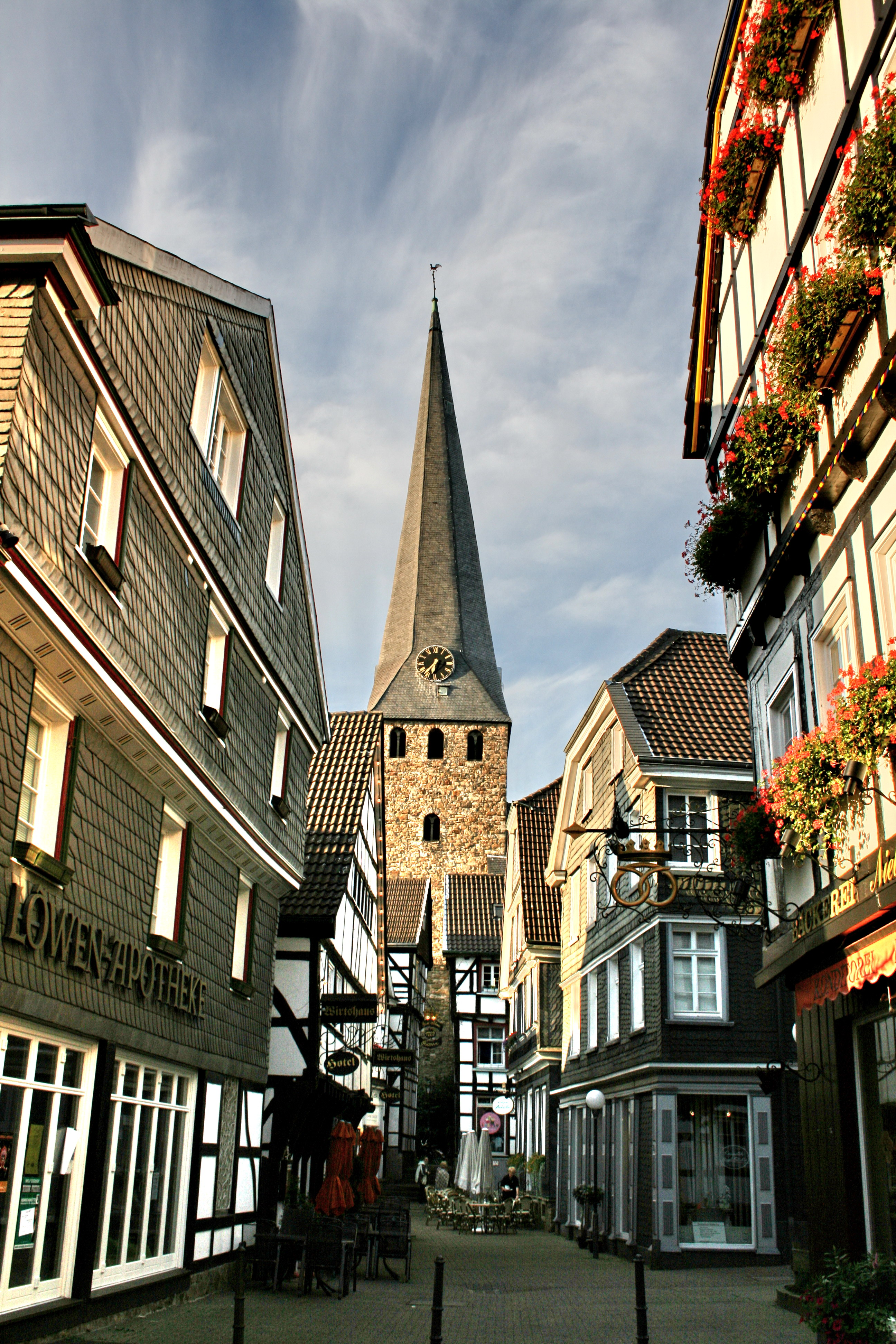 Hattingen (Ruhr): Altstadt